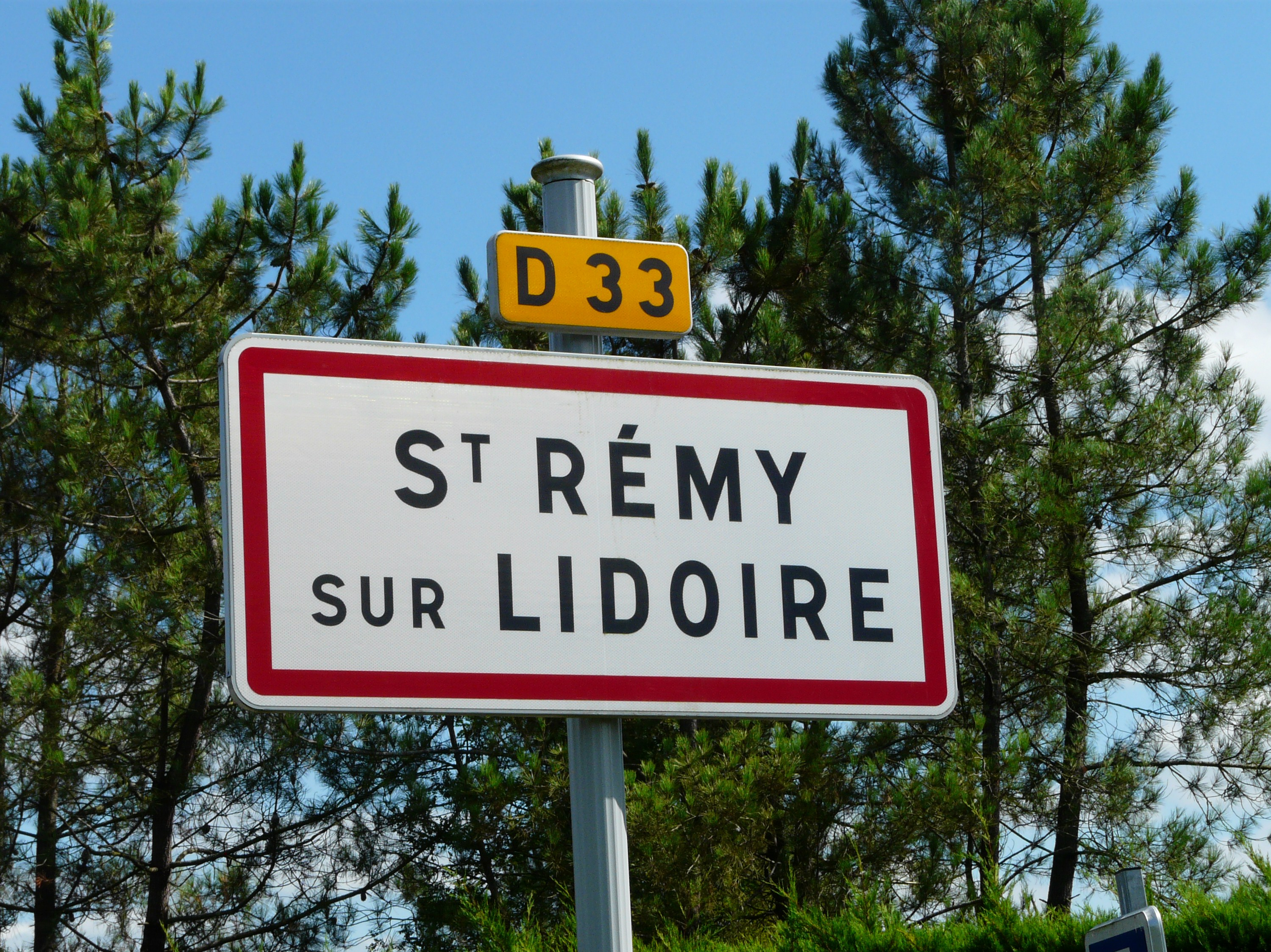 Panneau d'entrée dans le village de Saint-Rémy, Dordogne, France.